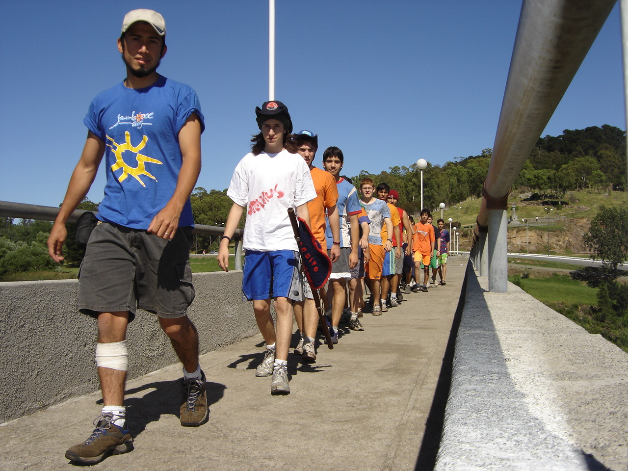 CaminantesRGorostiaga